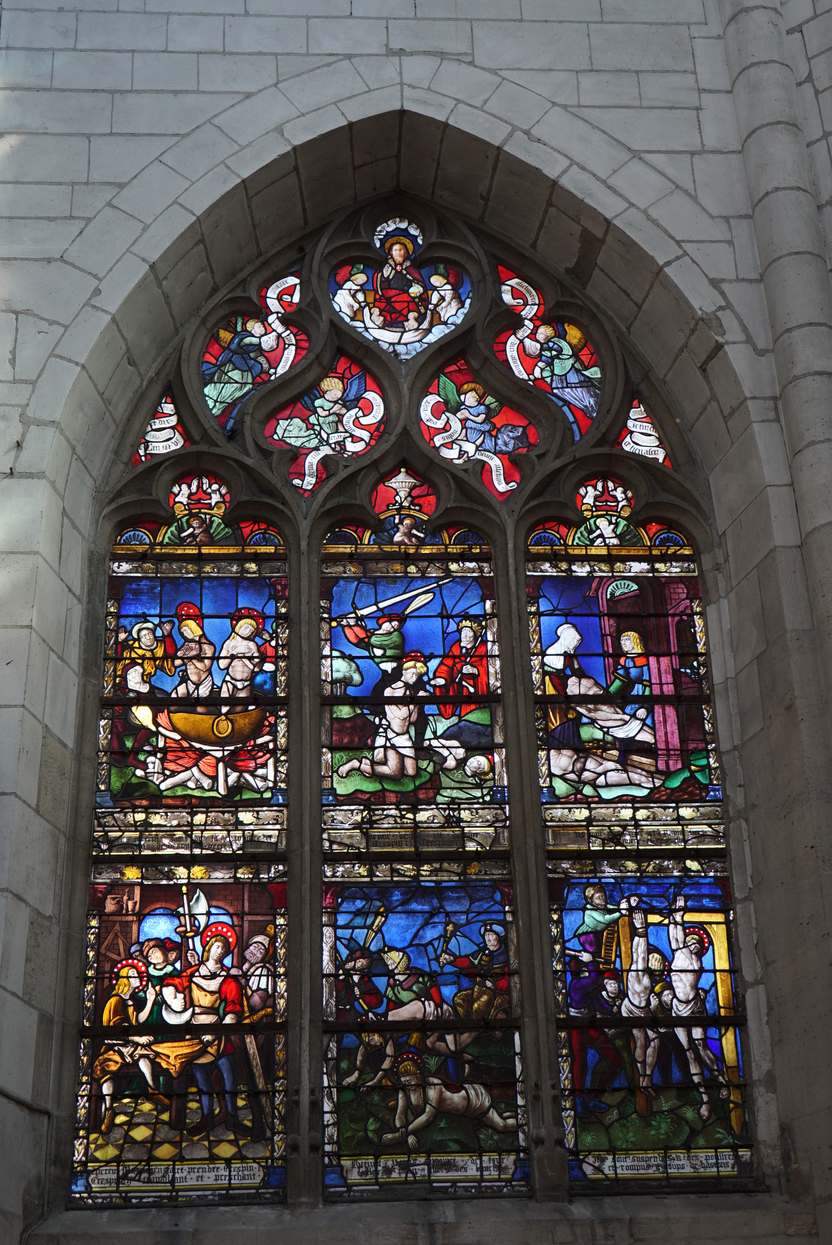 inntérieur de l'Église Saint-Étienne d'Arcis.